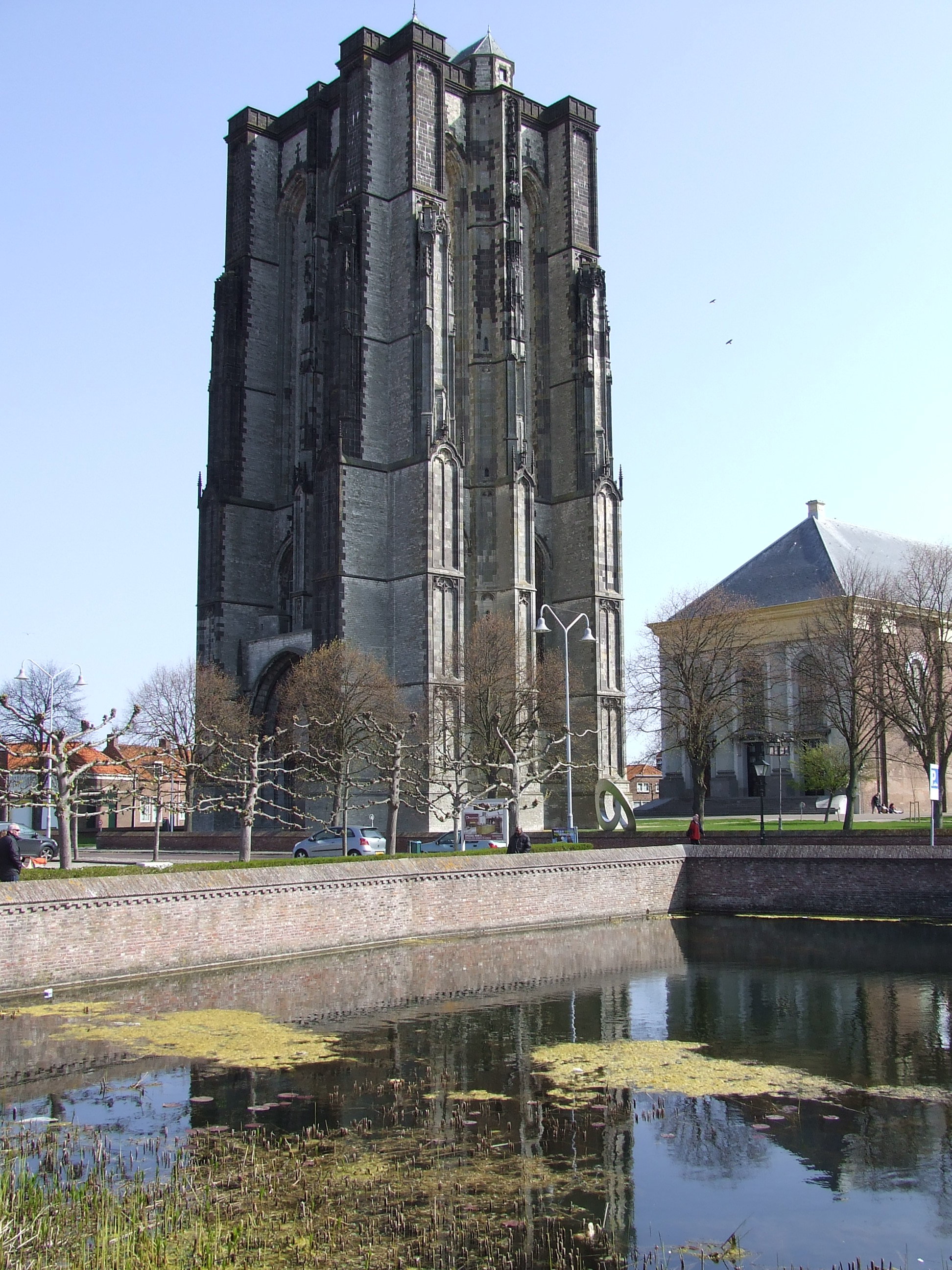 Turm des Sint-Lievens-Münsters in Zierikzee